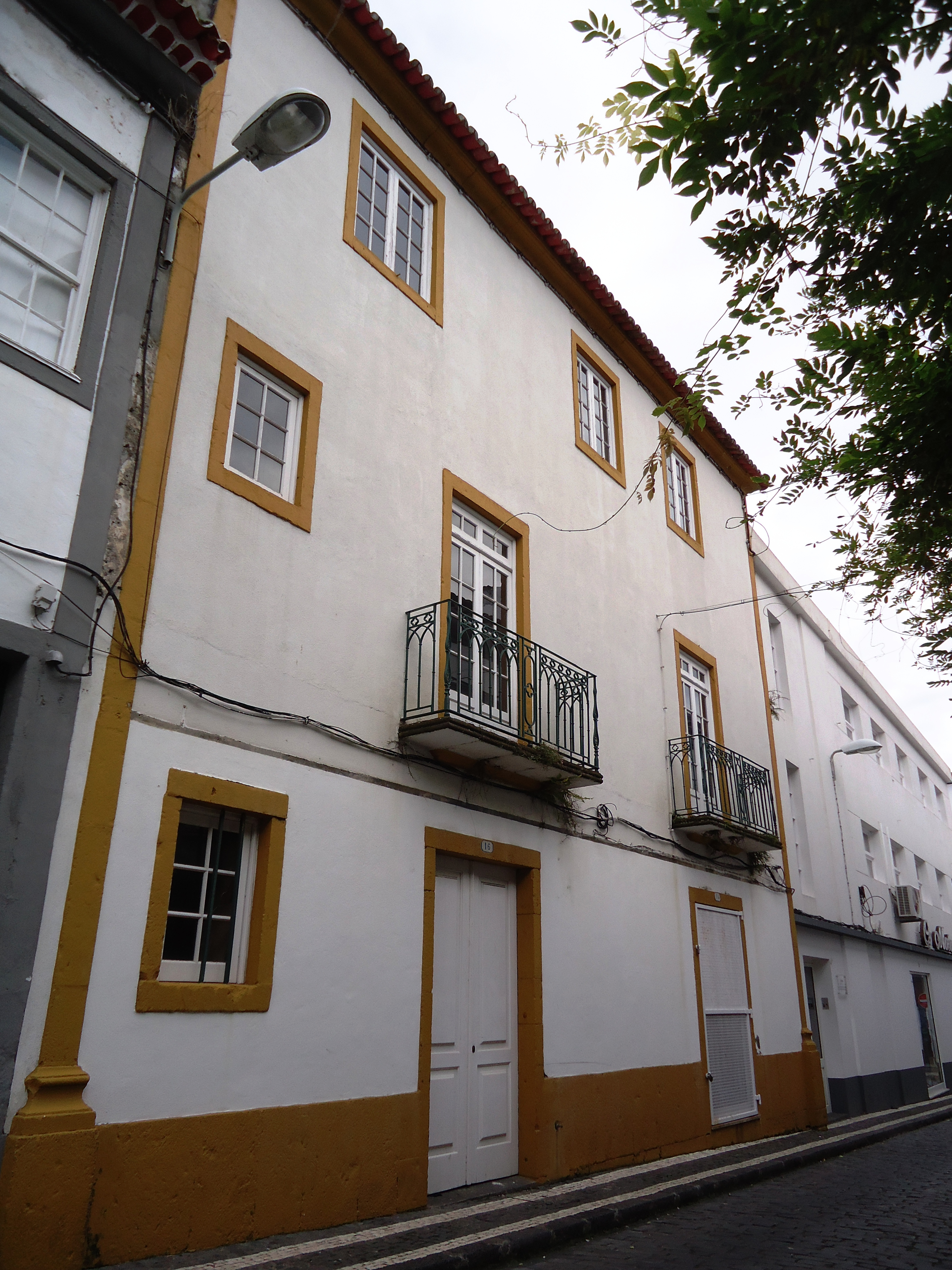 Sinagoga Shaar Hashamain, cidade e concelho de Ponta Delgada, ilha de São Miguel, Açores.